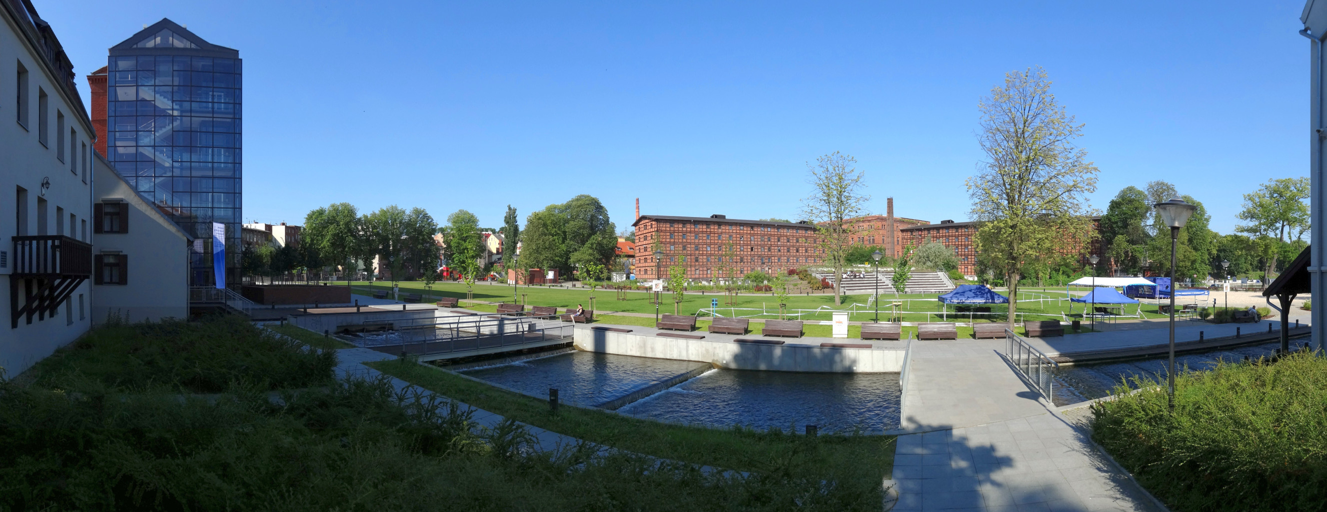 Kaskada Międzywodzie na Wyspie Młyńskiej w Bydgoszczy